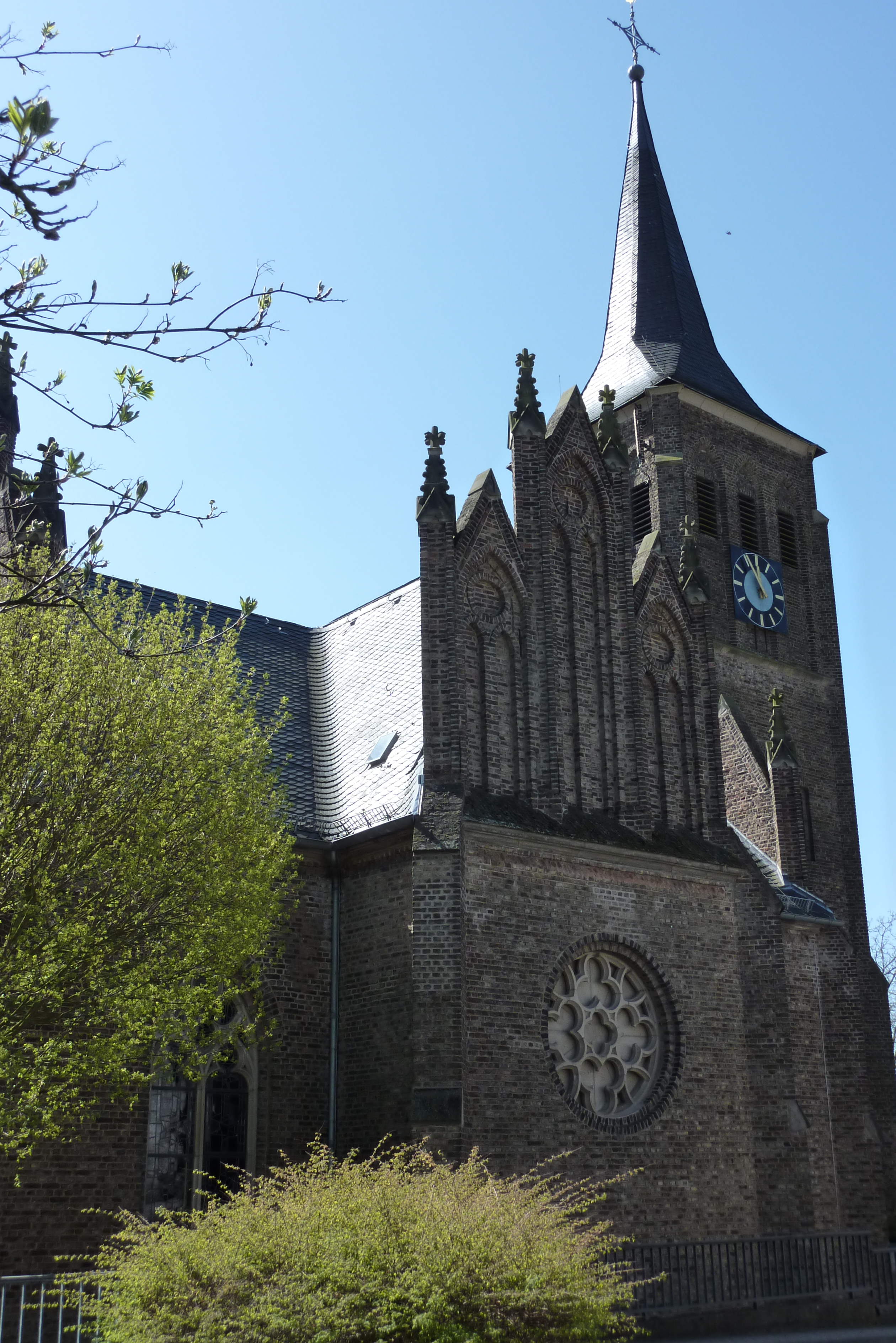 Kirche St. Sebastianus in Bad Bodendorf, Außenaufnahme des alten Teils